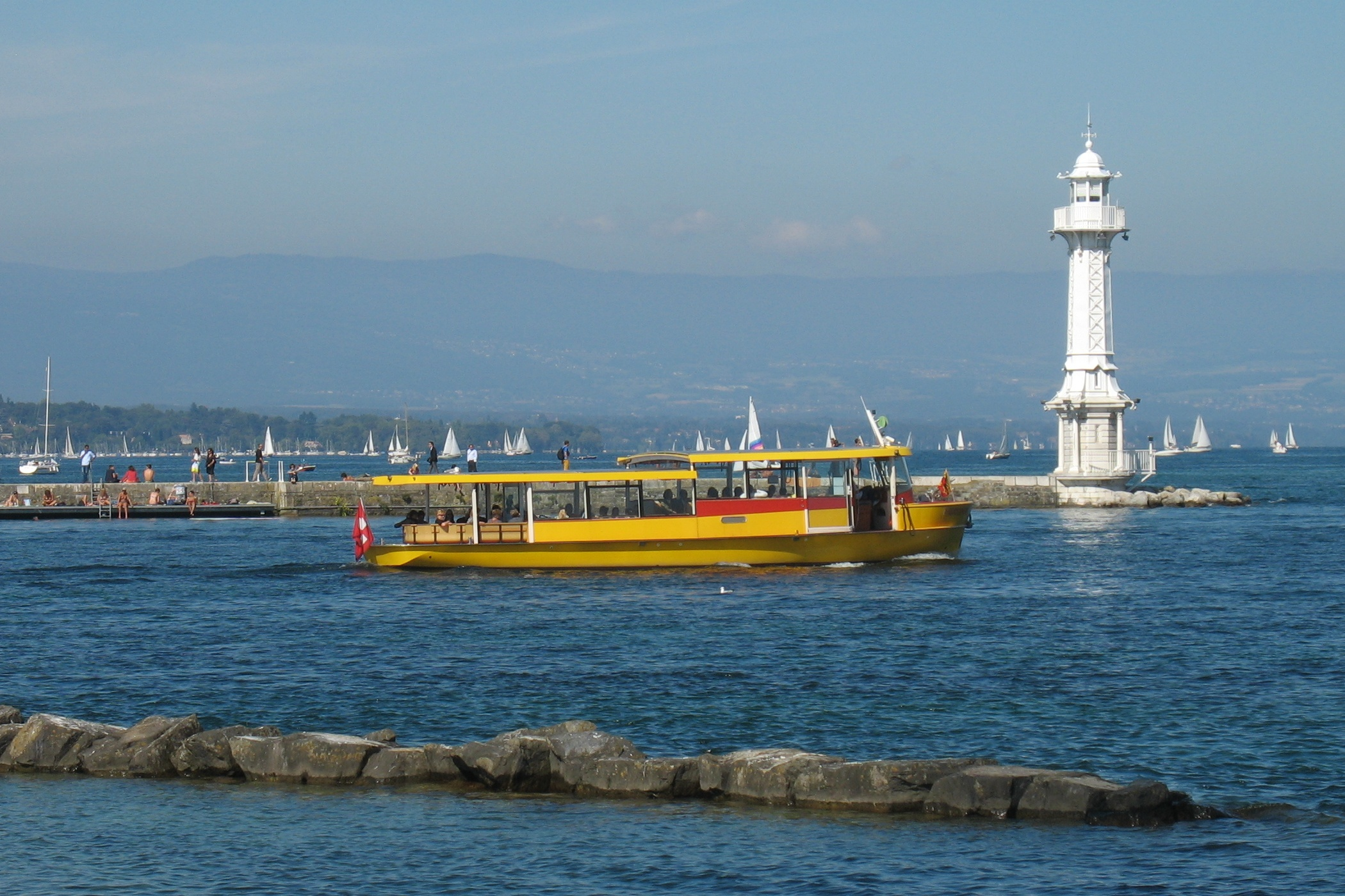 Mouette genevoise devant la phare.